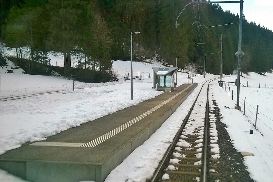 Halte CJ de La Combe (commune de Lajoux) vue depuis l'arrière d'un train CJ